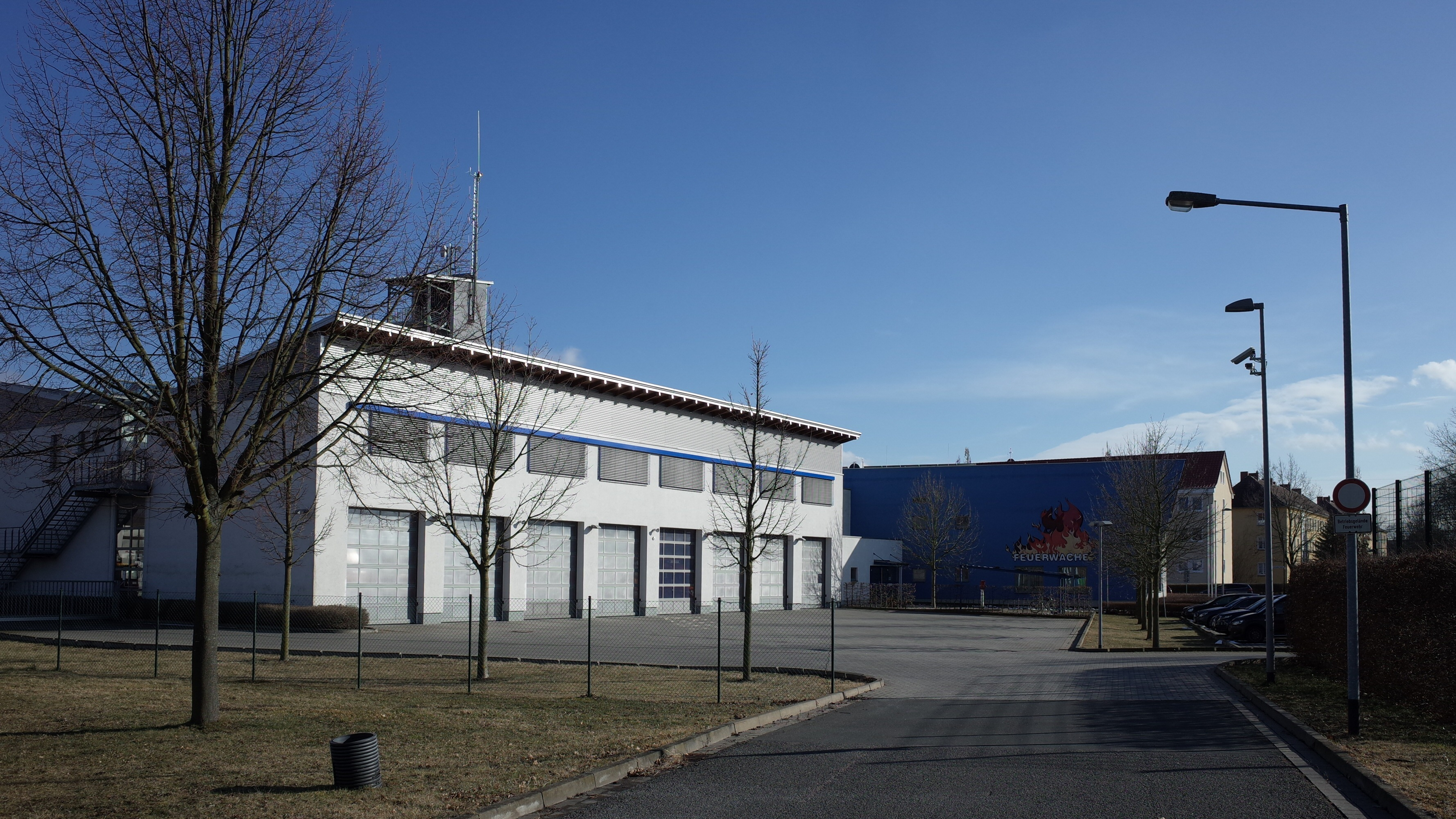 Dessau-Roßlau, die Feuer- und Rettungswache der Berufsfeuerwehr, und der Freiwilligen Feuerwehr Dessau-Süd, in der Innsbrucker Straße 8.